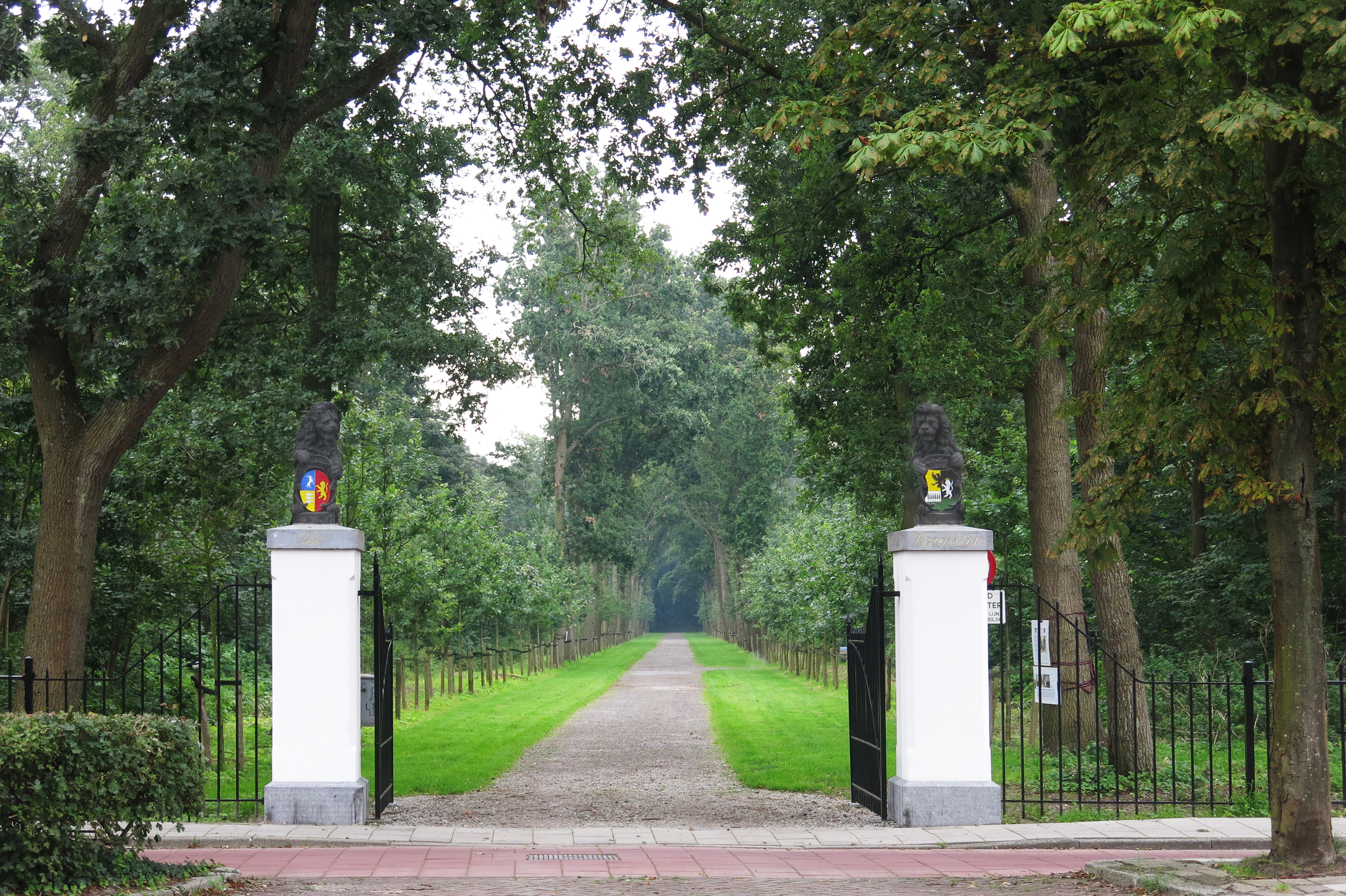 De oprijlaan van Ter Coulster is weer in oude luister hersteld